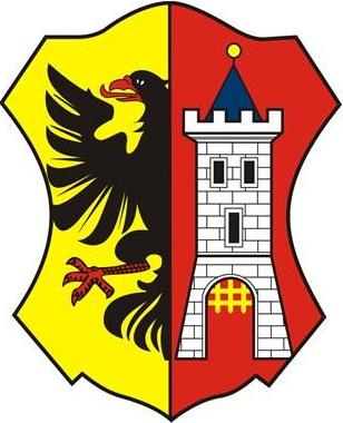 Oficiální znak města Město Touškov